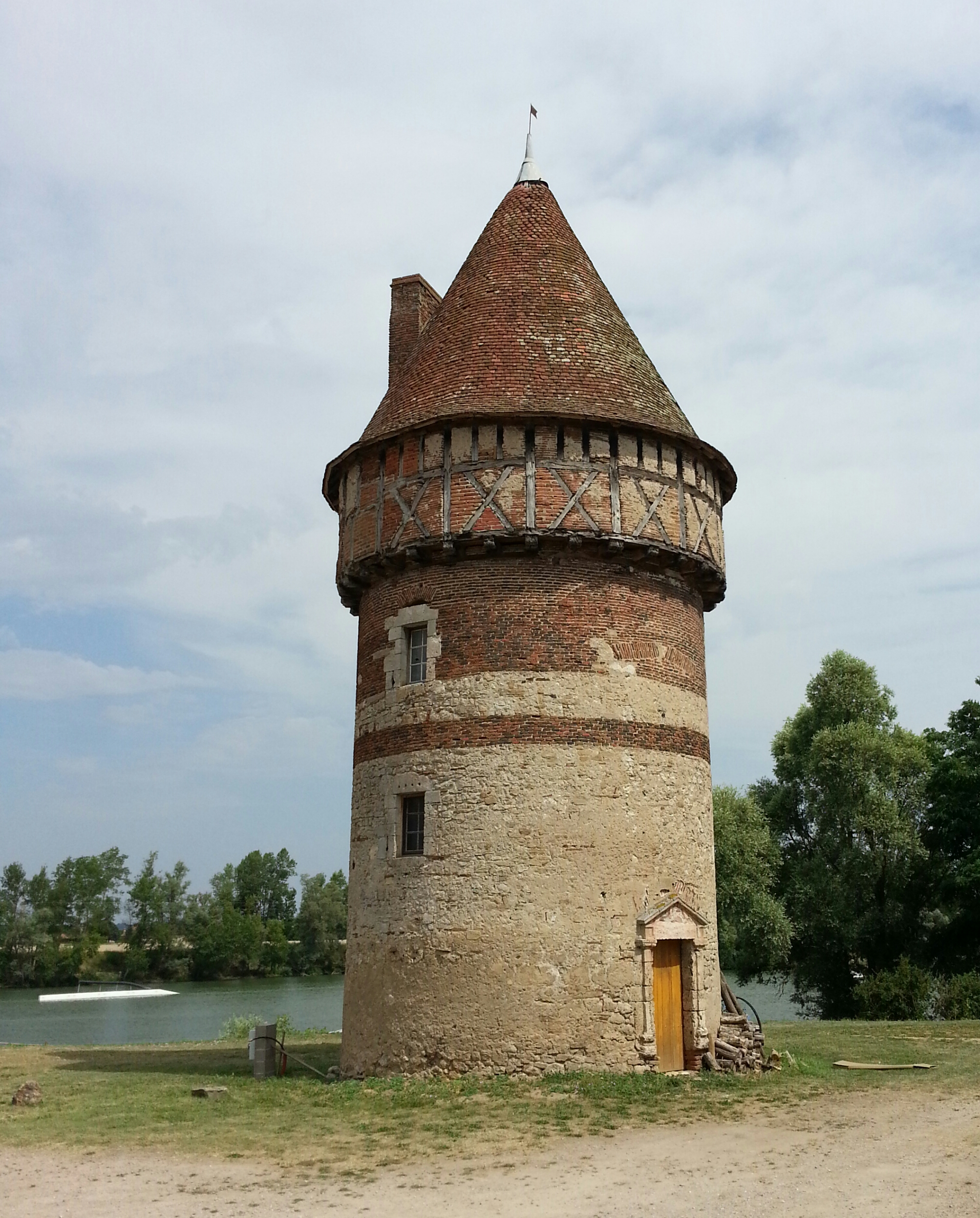 Tour de Villemouze à Paray-sous-Brailles dans l'Allier, France